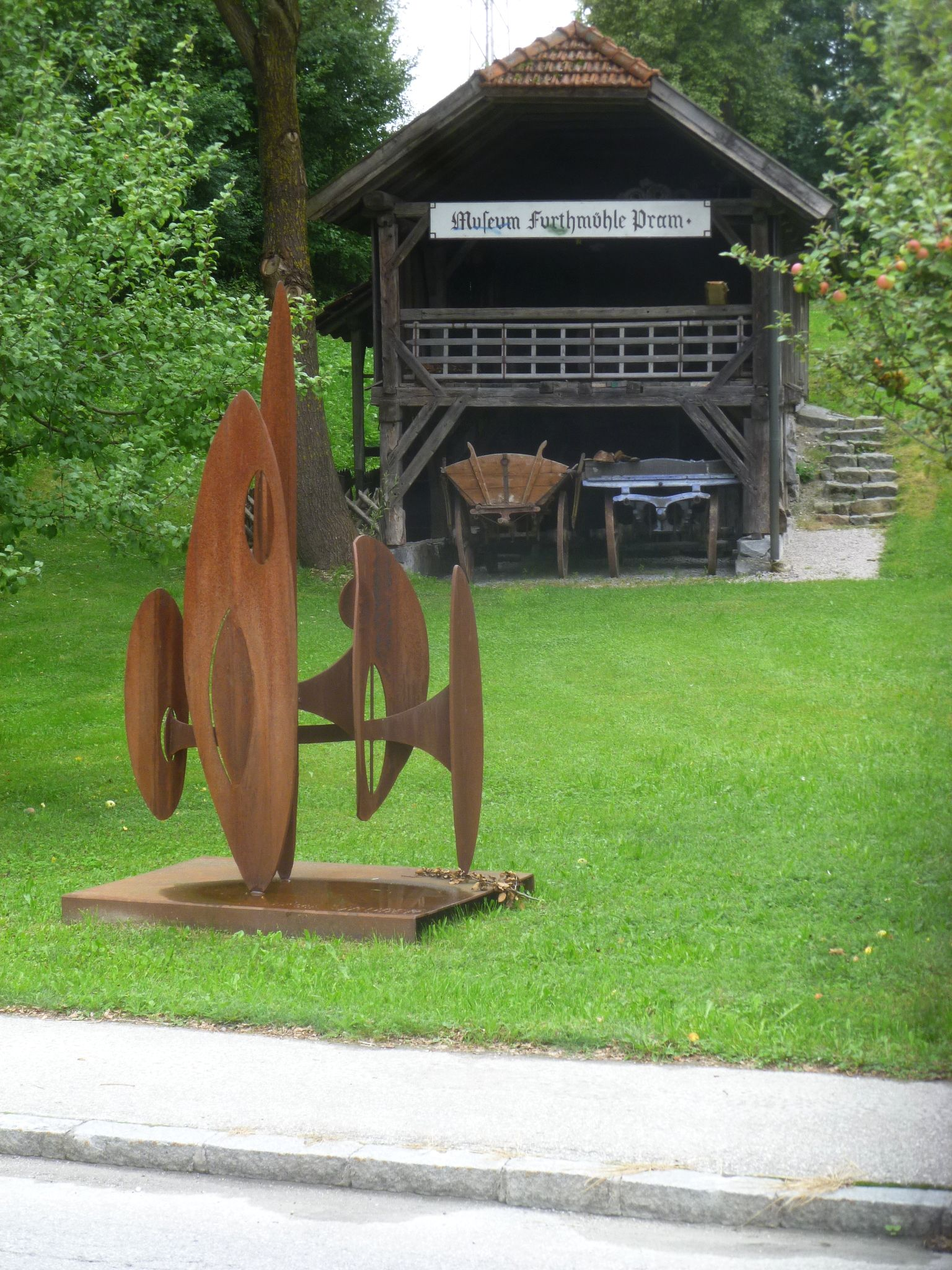 Ehem. Furthmühle